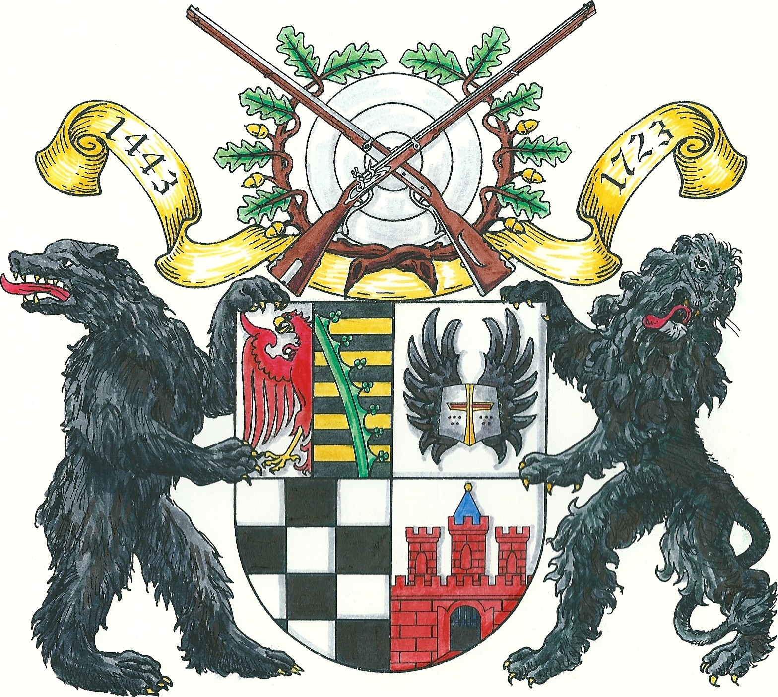 Wappen der Köthener Schützengilde